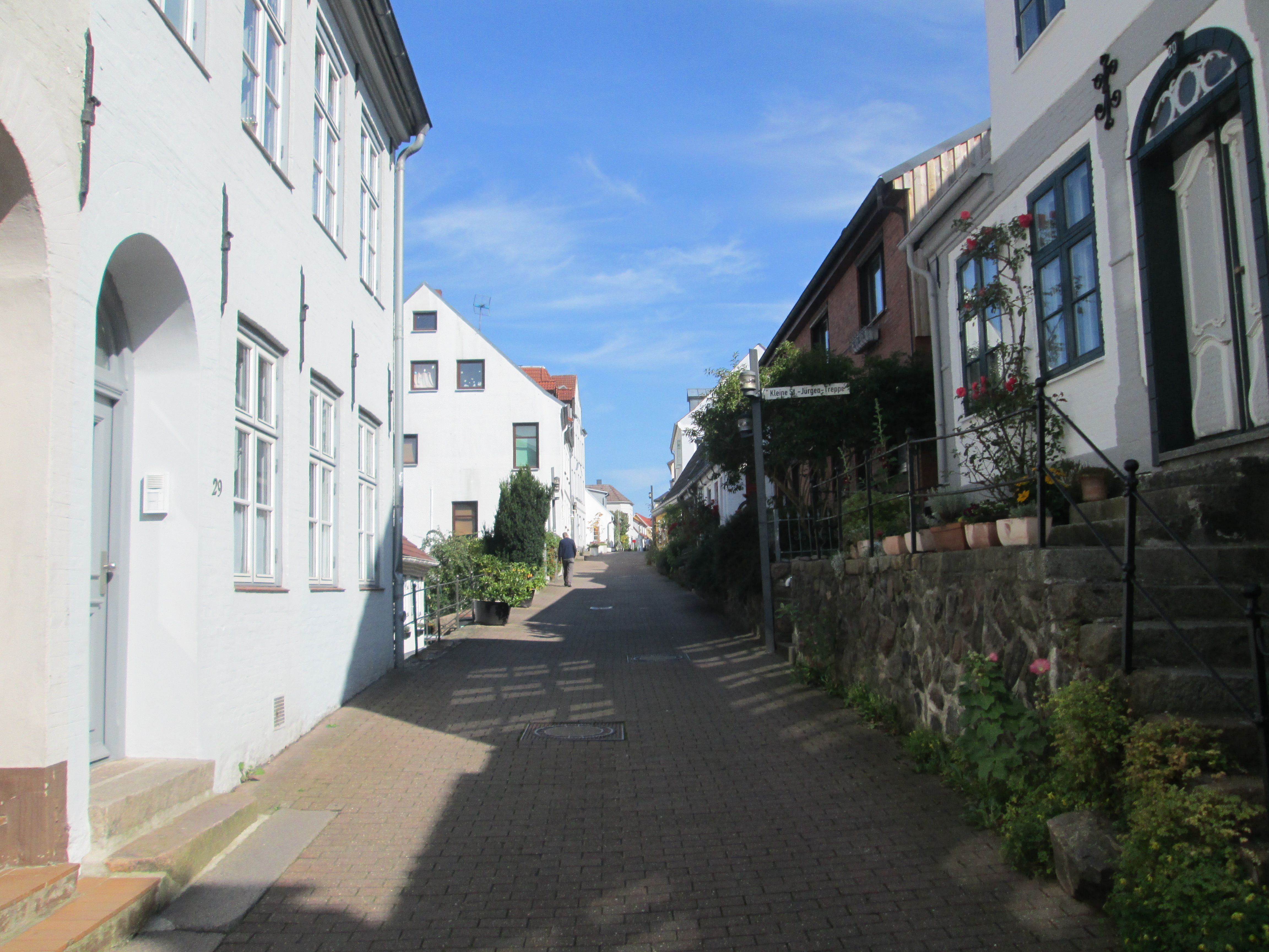 Sankt Jørgen-kvarter, Flensborg